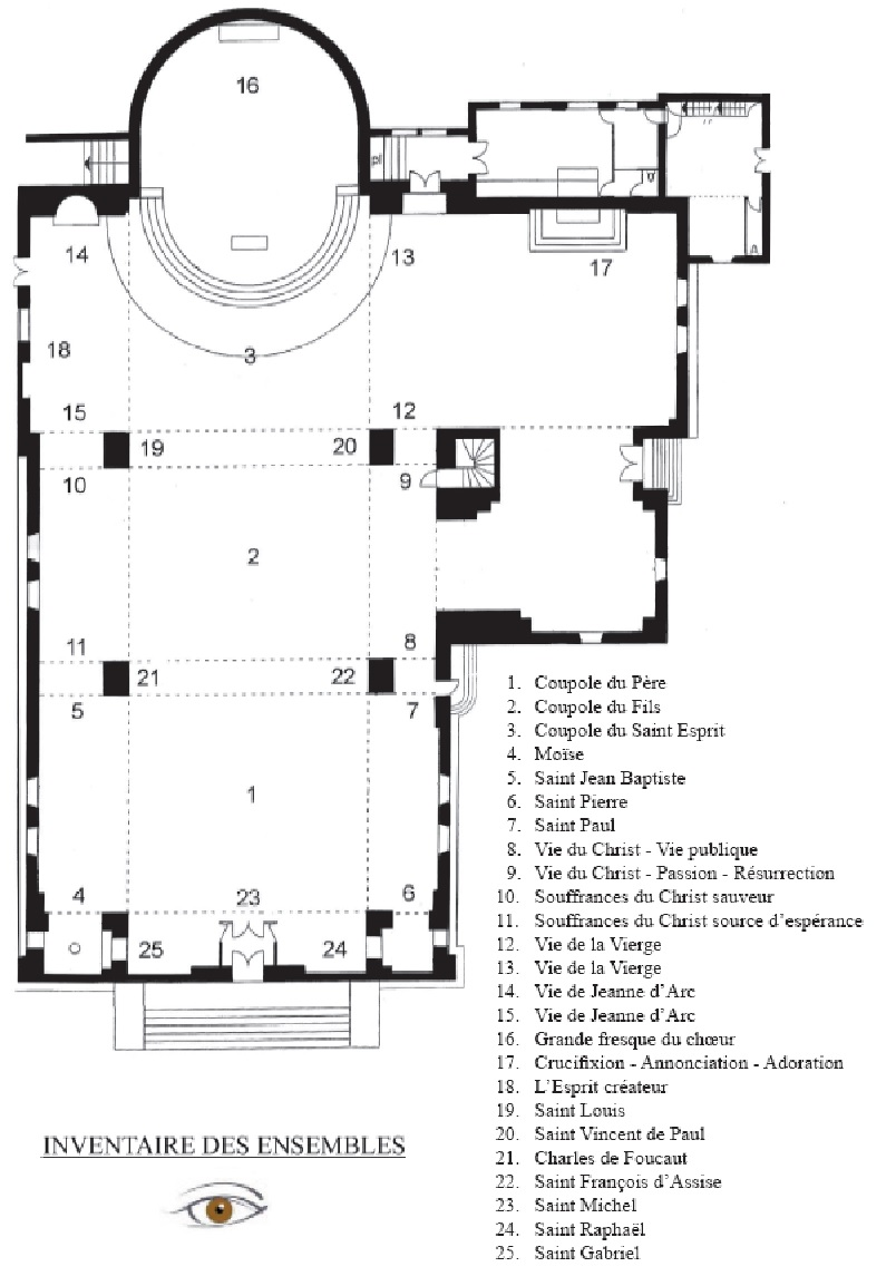 plan de l'eglise avec les differents points repris dans le texte